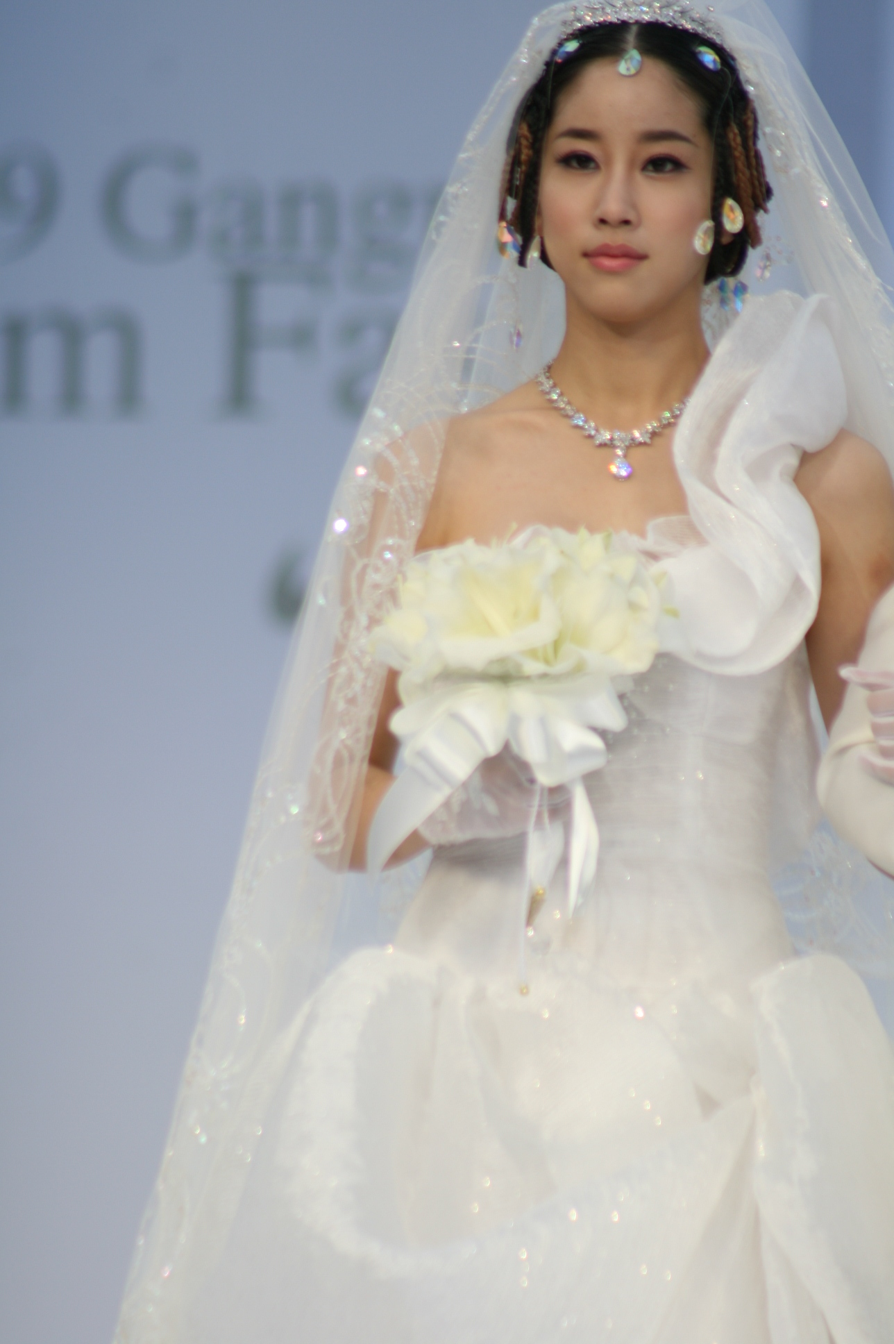 2009 강남 패션페스티벌 앙드레 김 패션아트 컬렉션